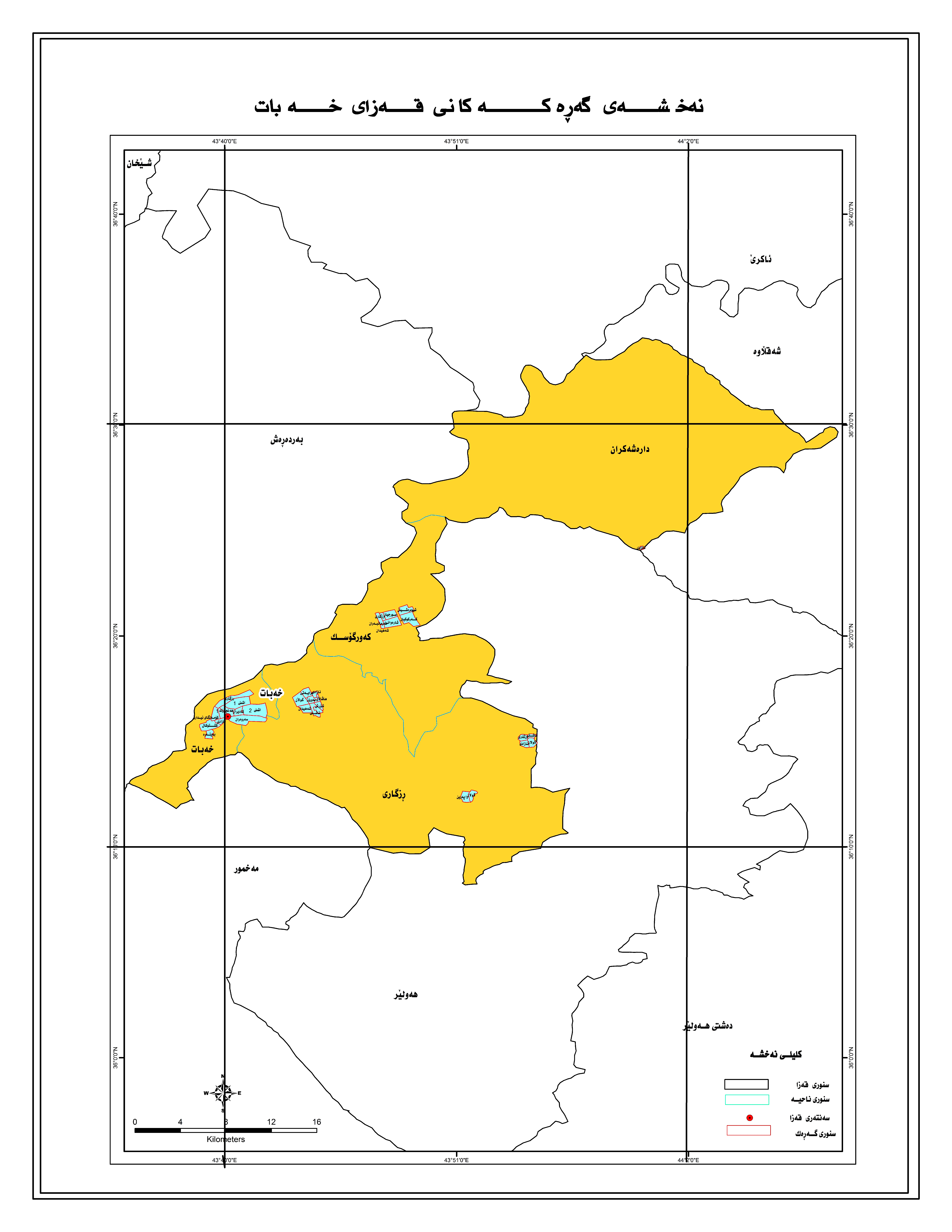 کوردی: بە بەکارهێنانى GIS